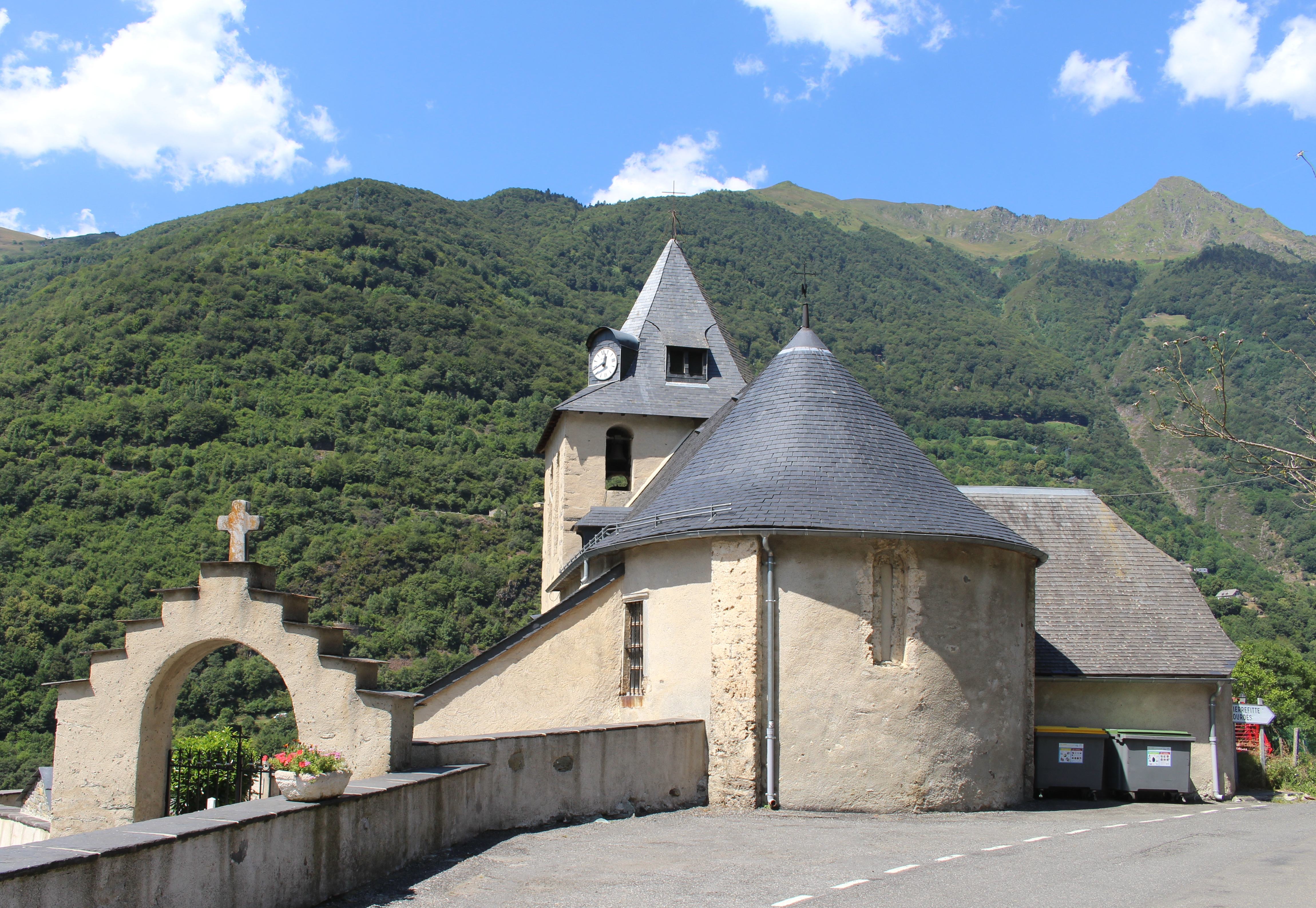 Église Saint-Barthélémy de Chèze (Hautes-Pyrénées)